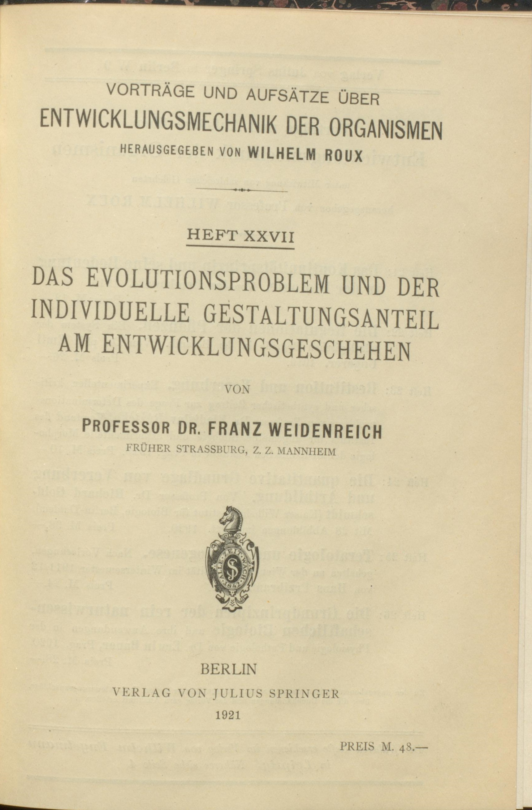 Franz Weidenreich Das Evolutionsproblem und der individuelle Gestaltungsanteil am Entwicklungsgeschehen Berlin : Verlag von Julius Springer, 1921 Titel